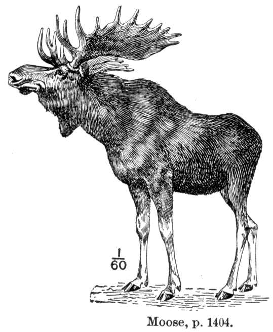 Elch